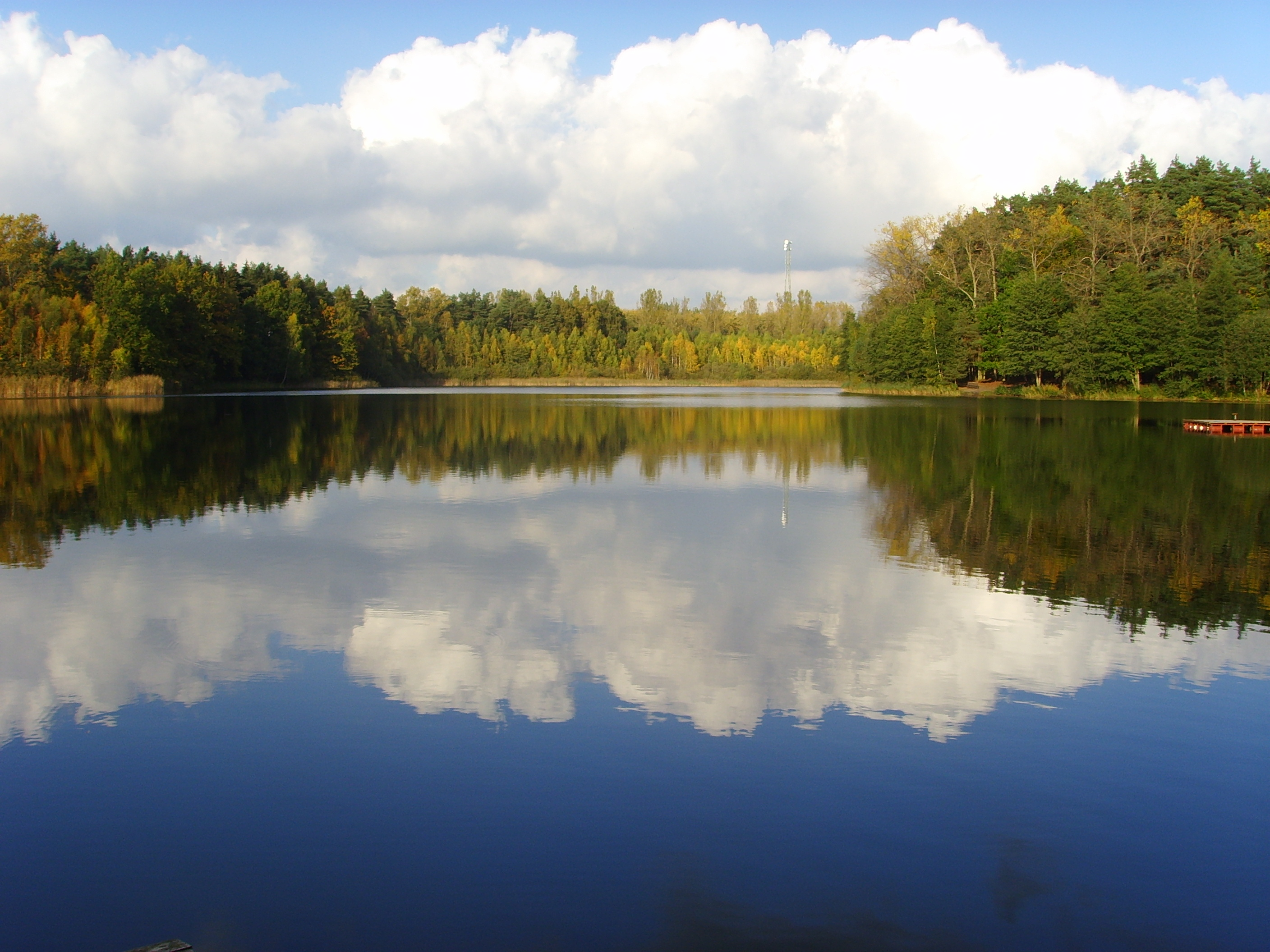 Der Rote See bei Brüel (Mecklenburg-Vorpommern)